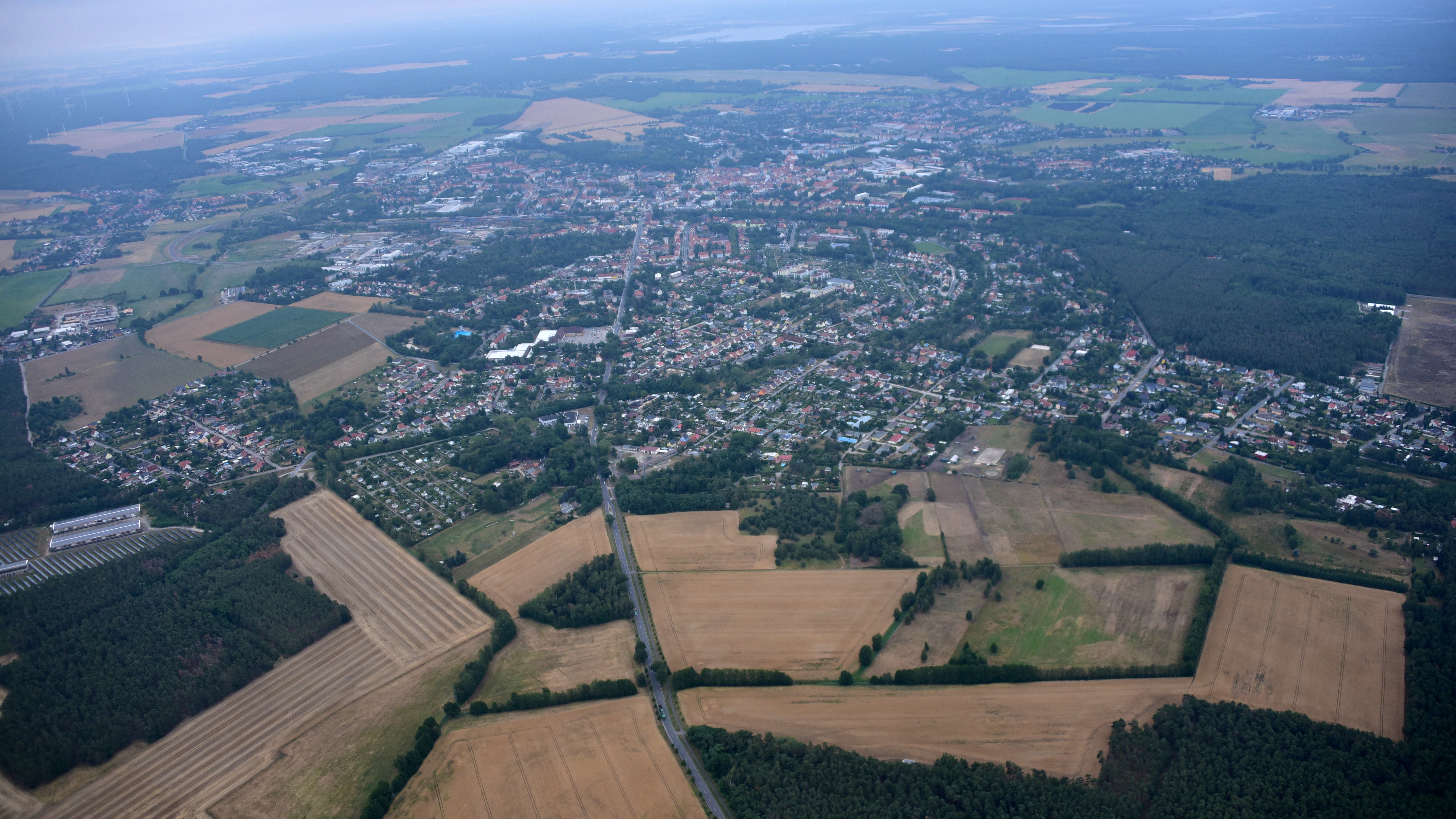 Finsterwalde, Luftaufnahme (2019)